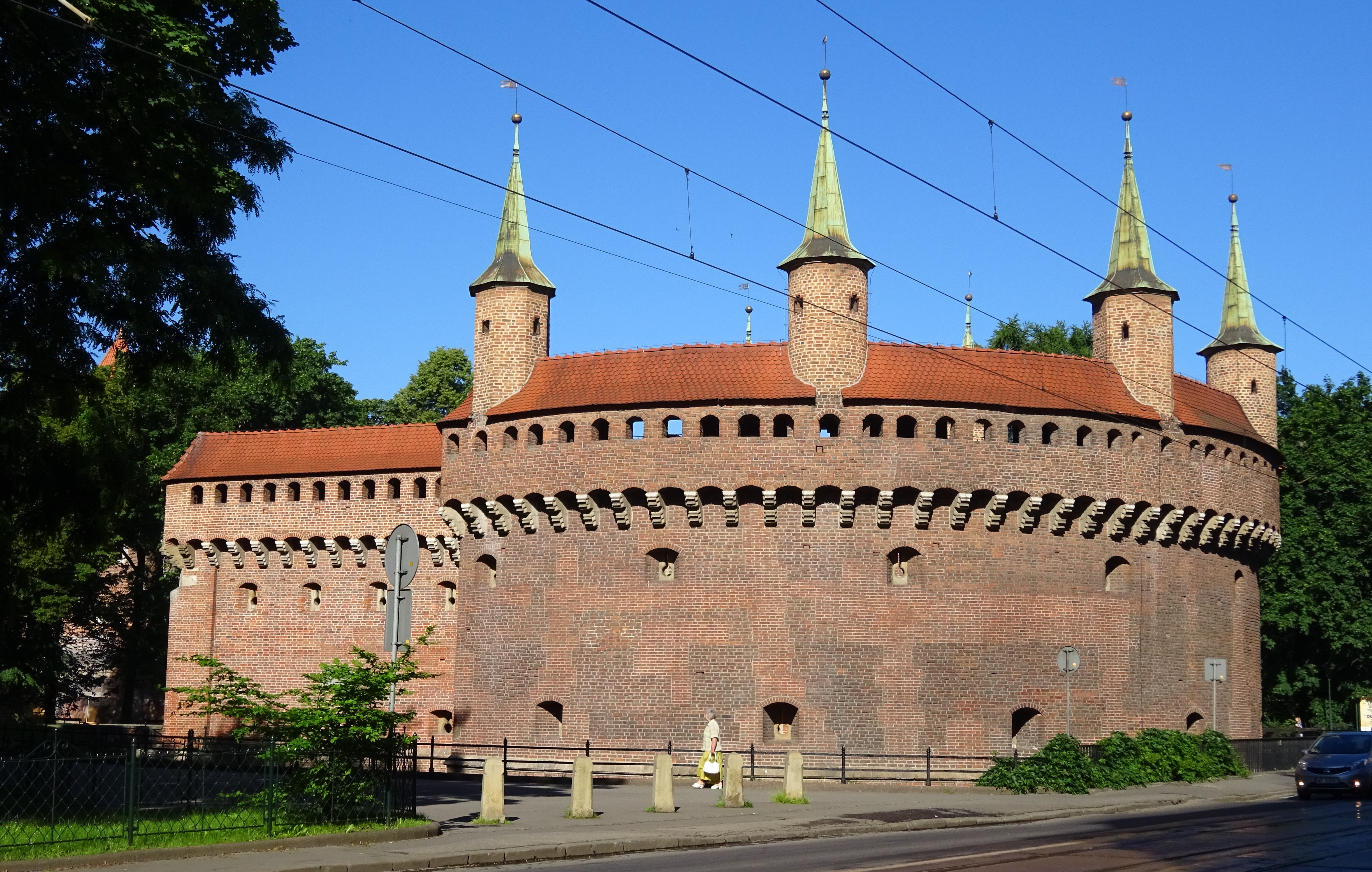 Barbakan w Krakowie, widok z ul. Basztowej.